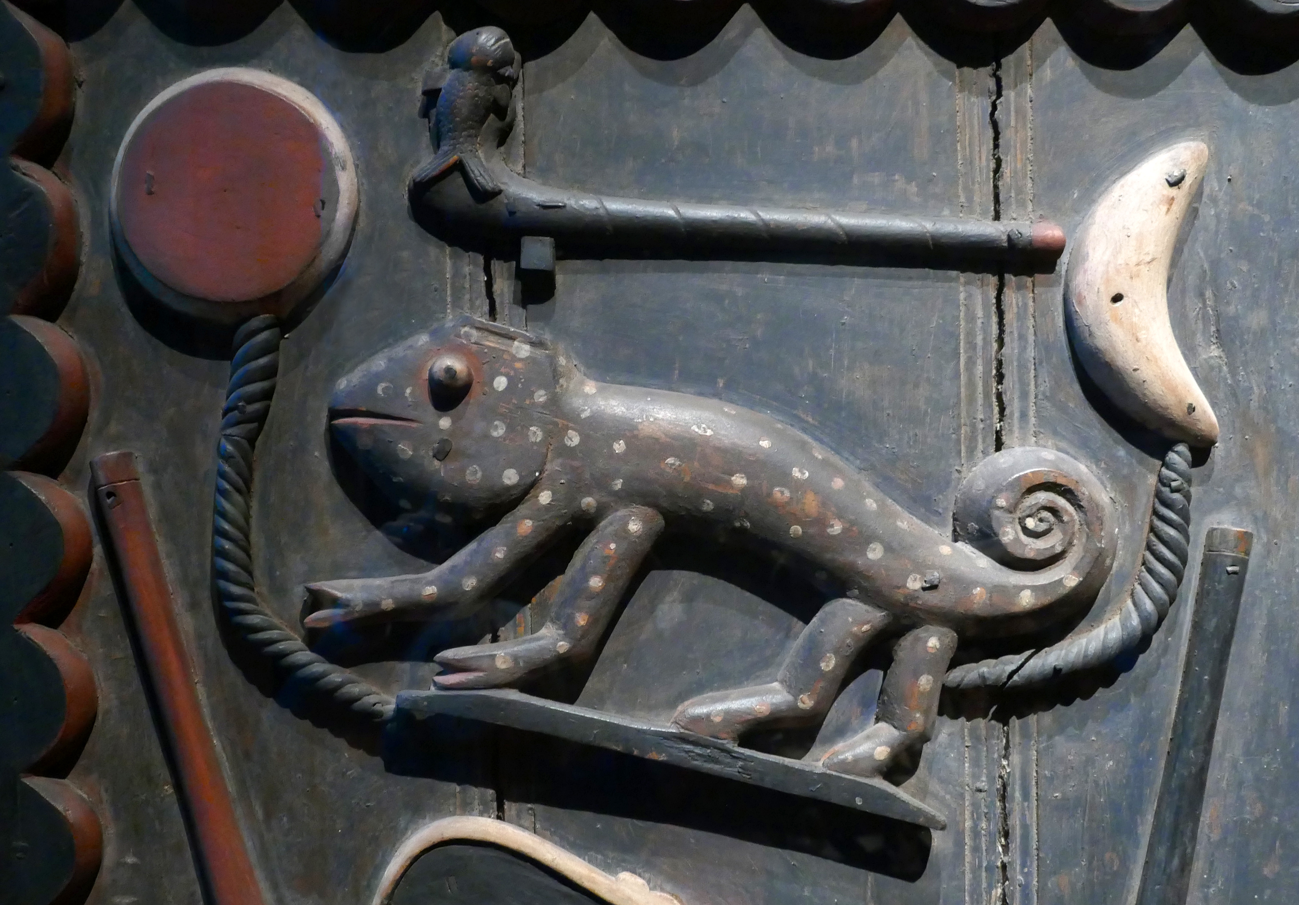 Porte du palais royal d'Abomey Atelier Sossa Dede Date : vers 1889 Bois polychrome, pigments, métal L'une des 4 portes exposées au musée du Quai Branly. N° d'inventaire : 71.1893.45.7